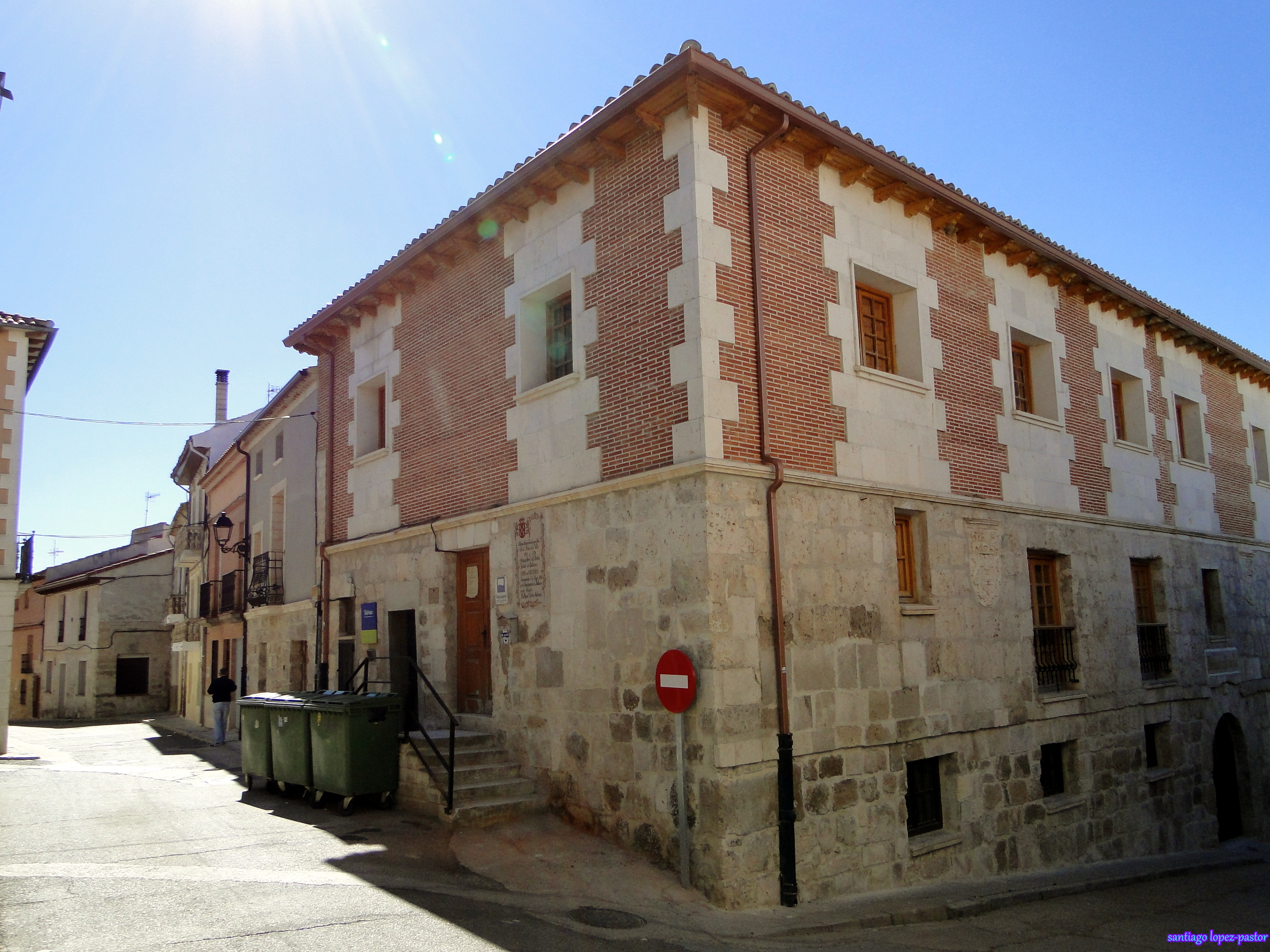 Baltanás